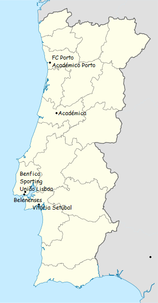 Carte des clubs participants au championnat du portugal de football de première division 1934-1935